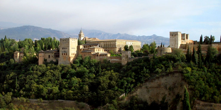 Alhambra de Granada desde el mirador de San Nicolás